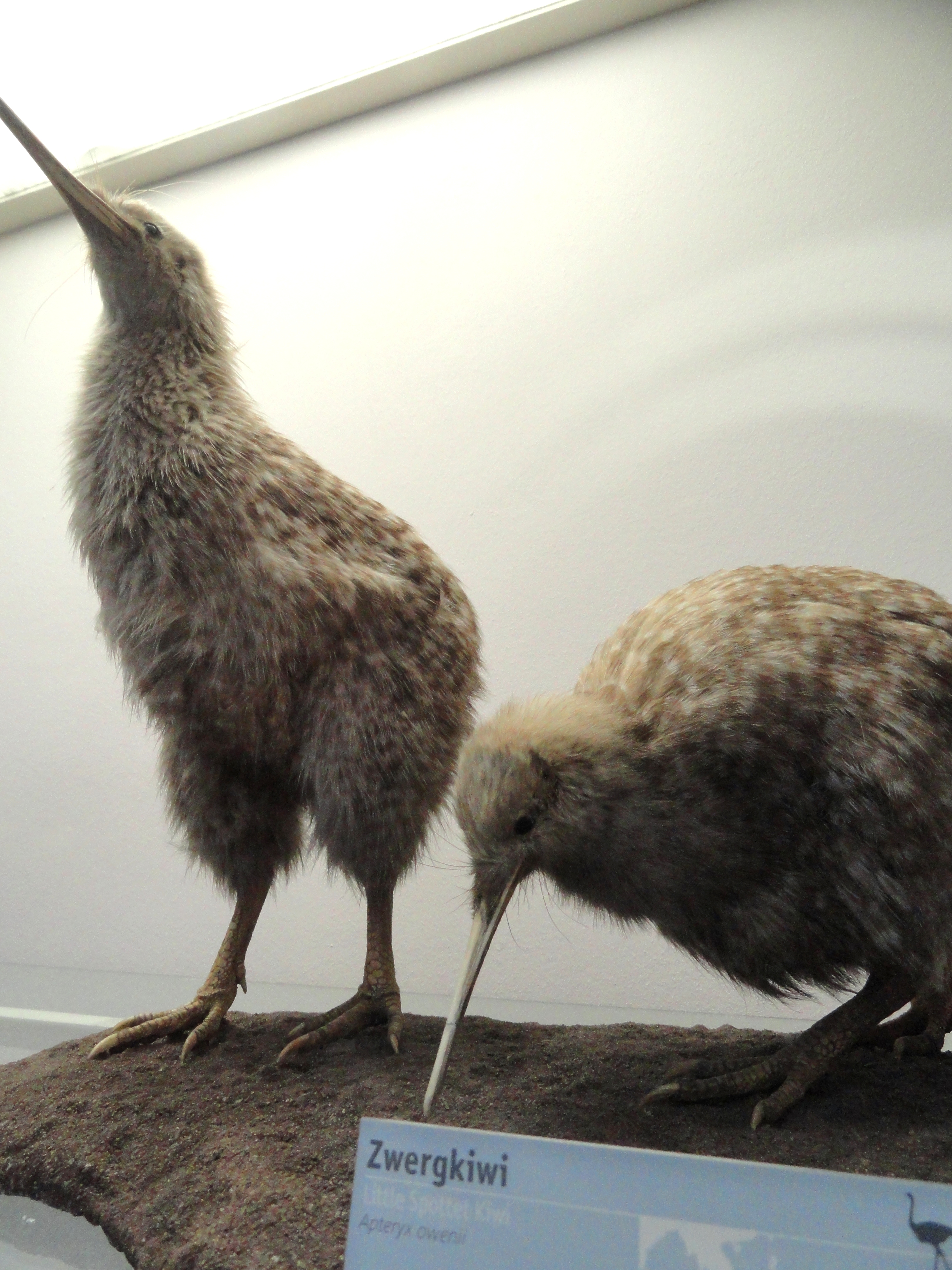 Exhibit in Naturmuseum Senckenberg, Frankfurt am Main, Germany.